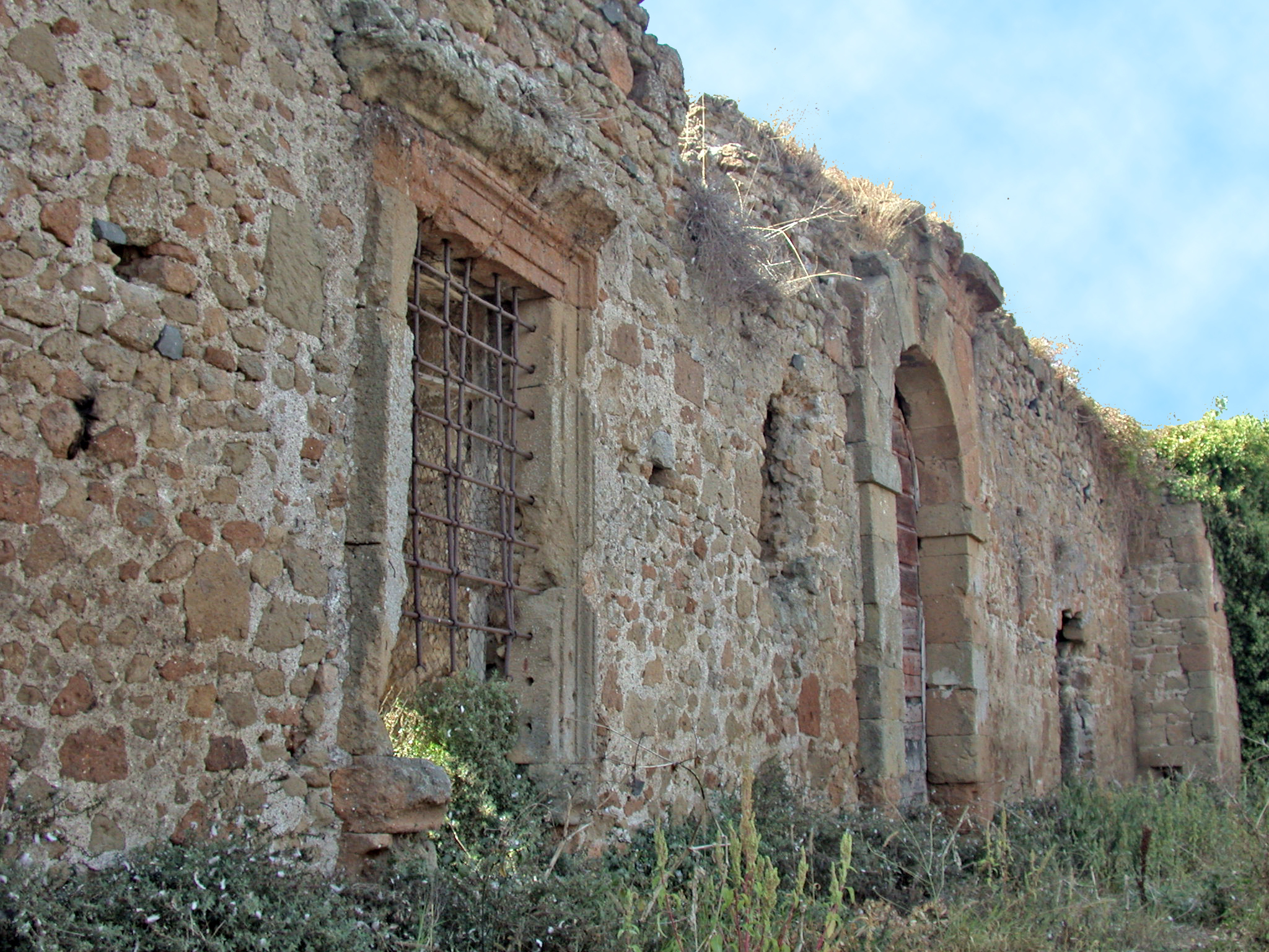 Italia, Lazio, provincia di Roma, Ardea: palazzo Sforza-Cesarini, facciata in rovina verso l'interno della città